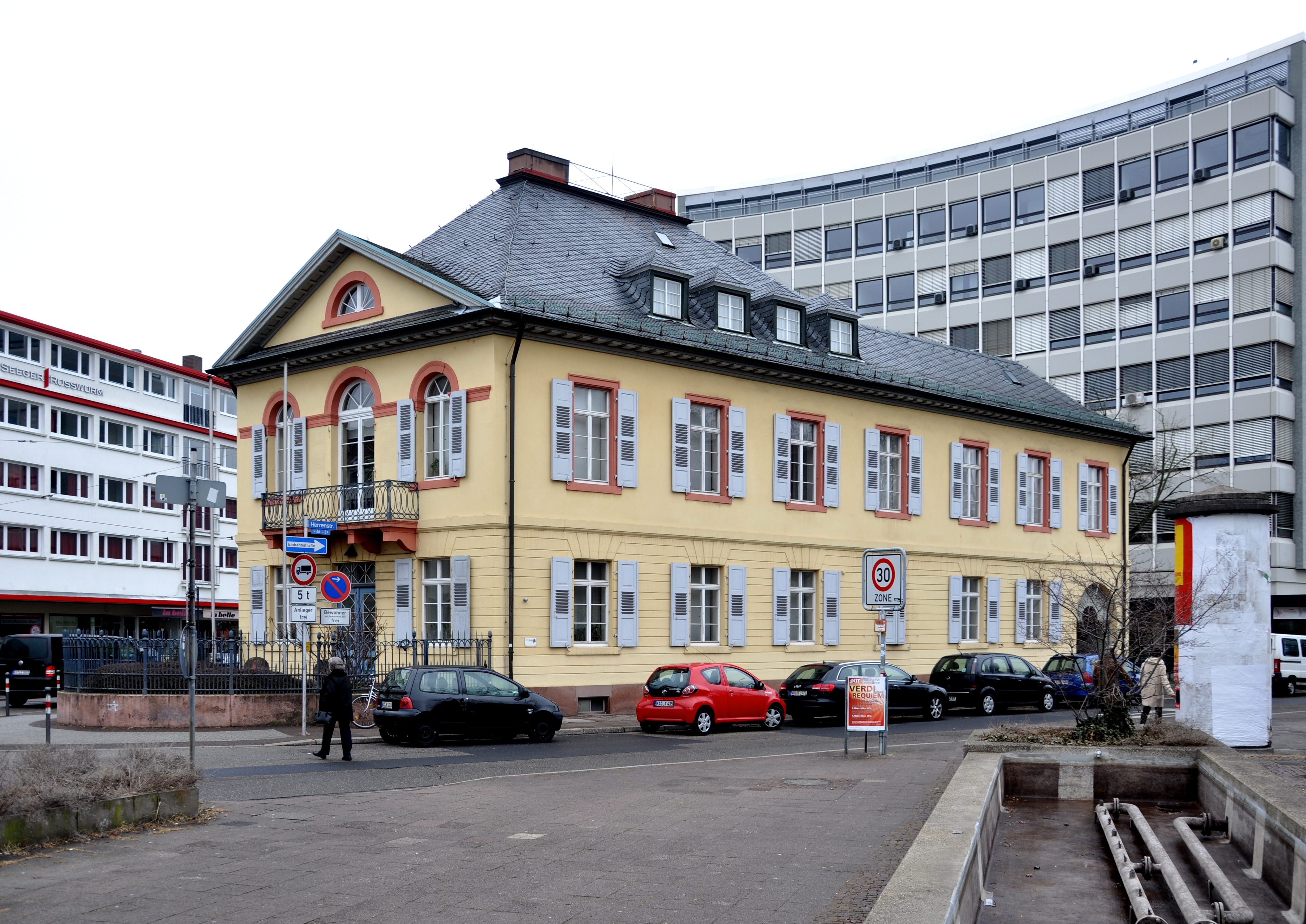 Karlsruhe, Haus Weltzien (Weltziensches Haus, Palais Weltzien) am Karlstor, Friedrich Weinbrenner zugeschrieben